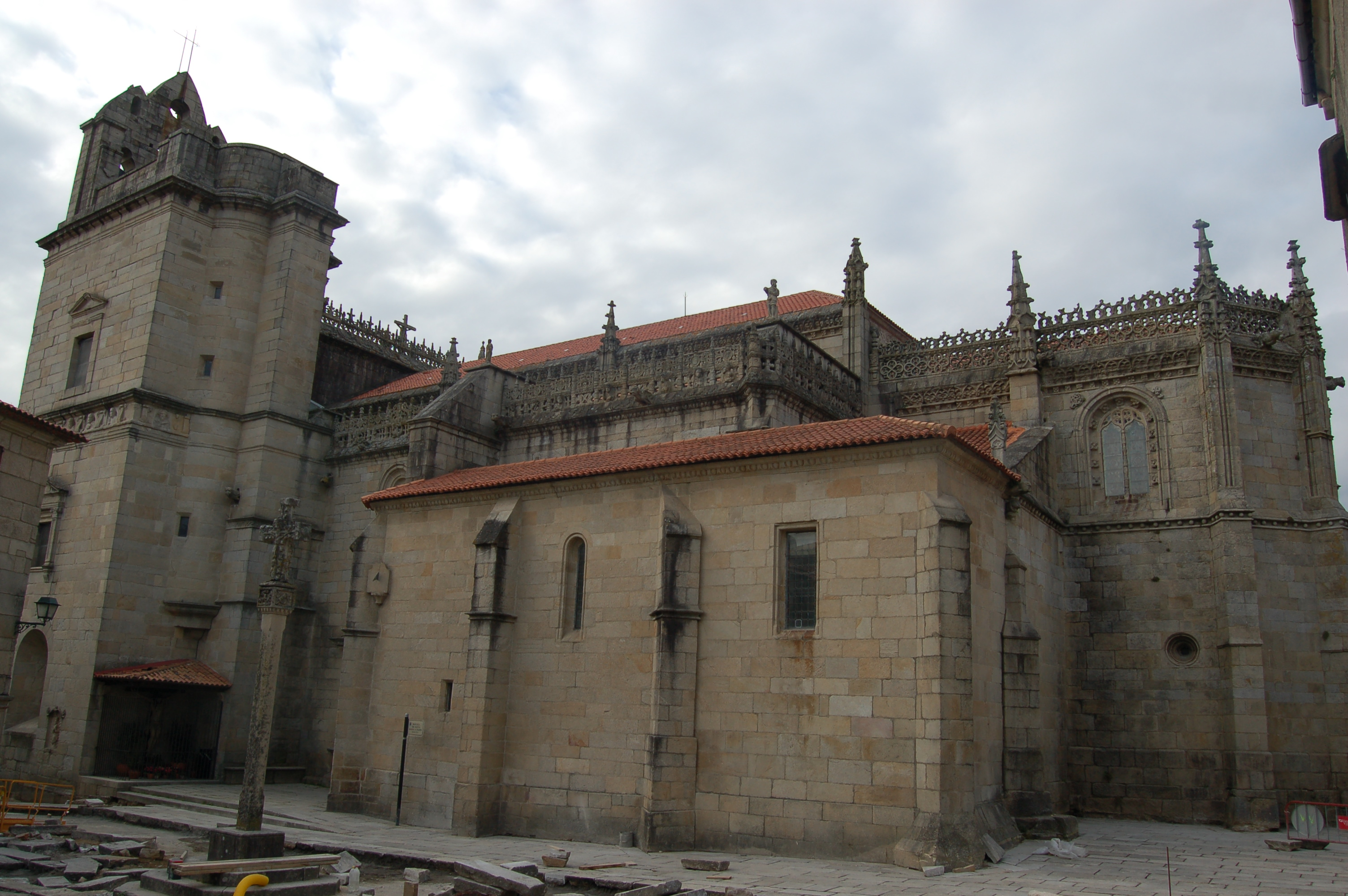 Basílica de Santa María a Maior de Pontevedra